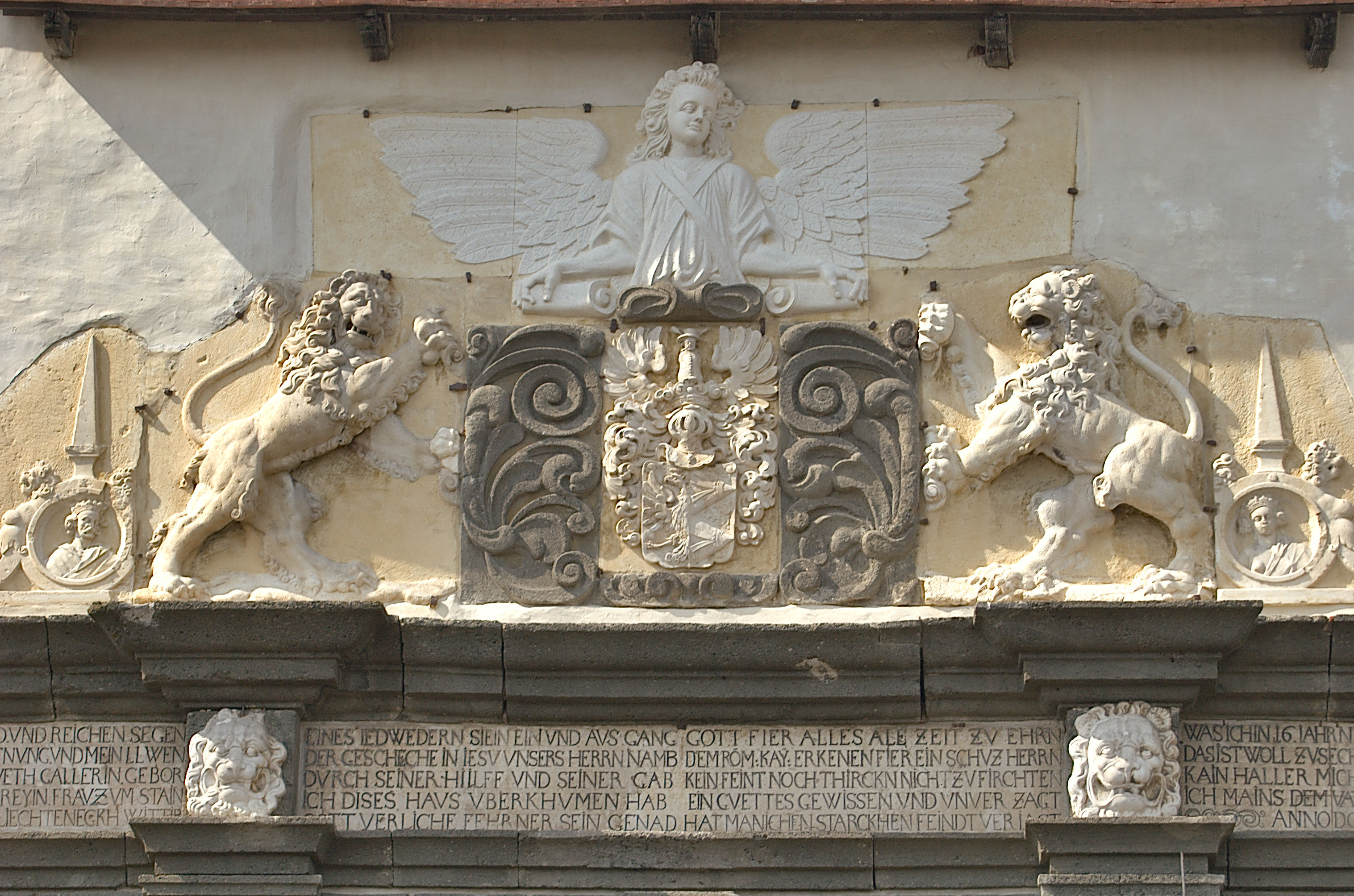 Riegersburg, Wenzelstor, Relief mit Wappen Wechsler (Transkription der Inschriften siehe [1])